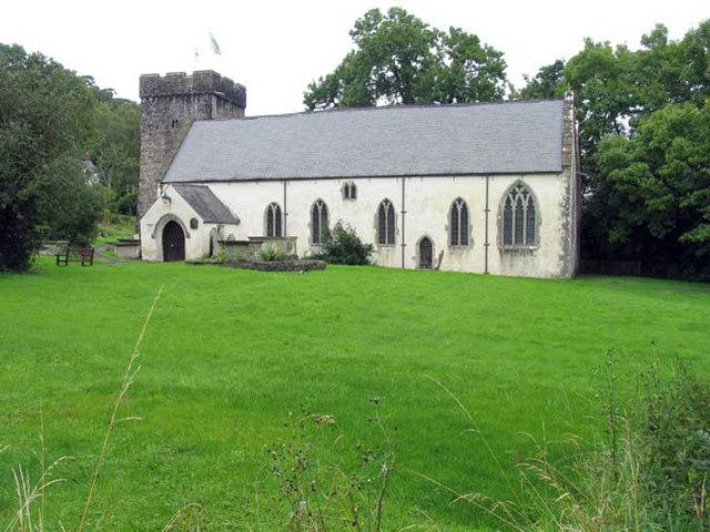 St Cadoc Llancarfan, Glamorgan, Wales